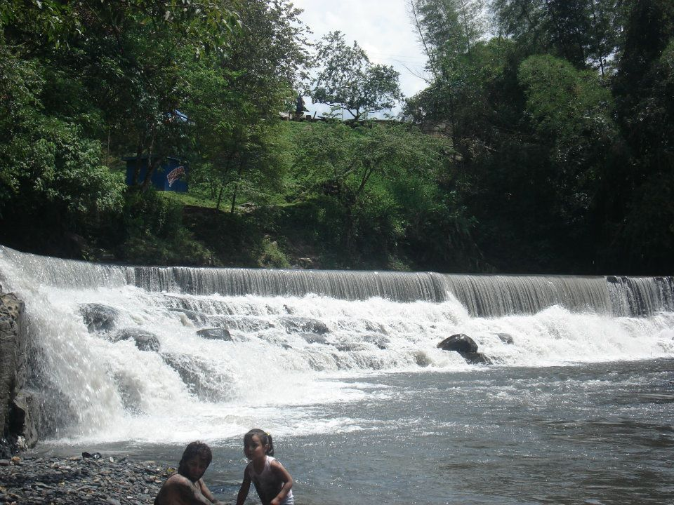 Panorámica de la Bocatoma